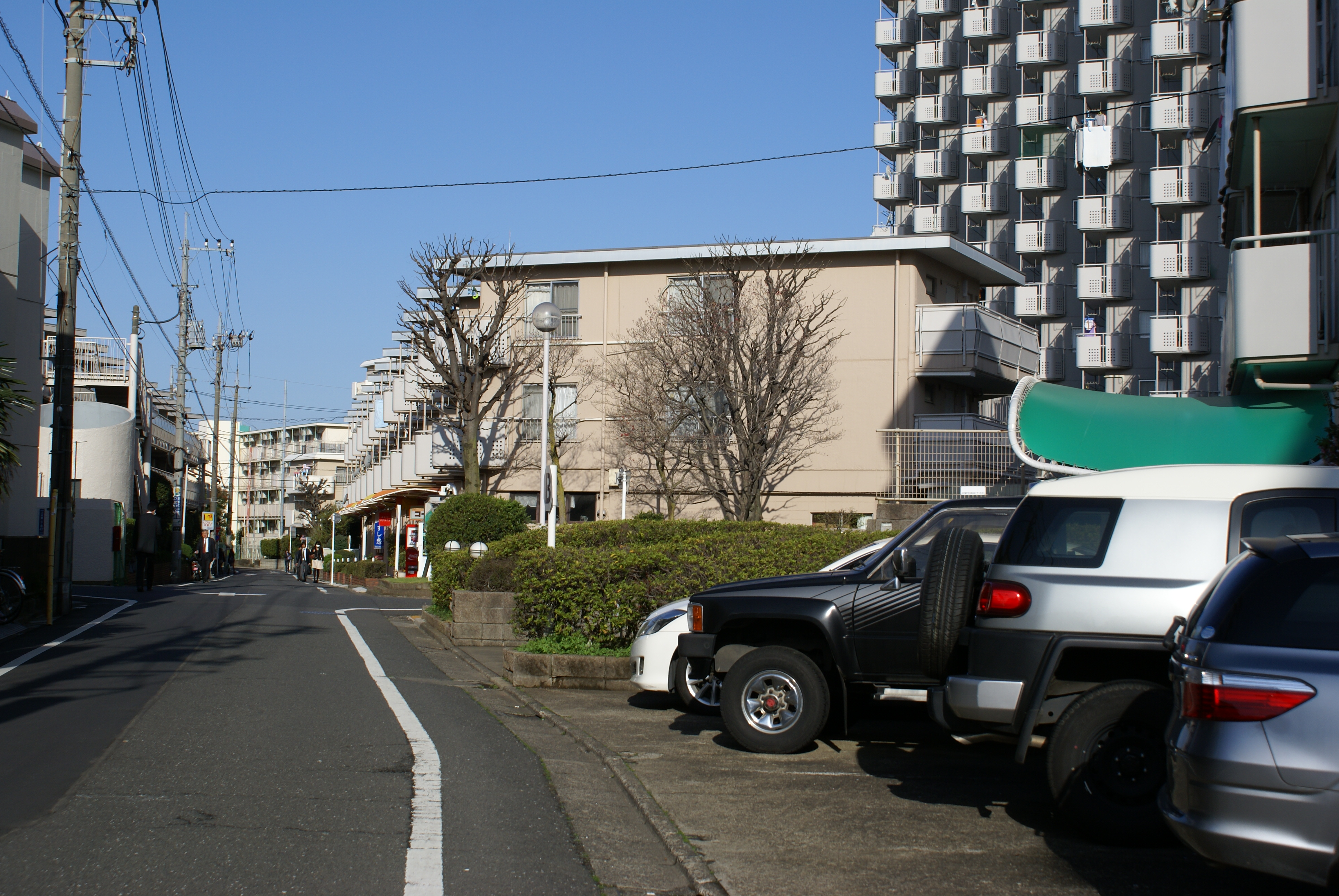 東武啓志線跡地